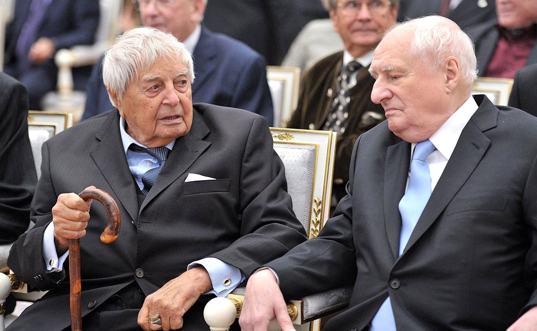 На церемонии вручения государственных наград. Режиссёр Юрий Любимов и художественный руководитель Московского государственного театра «Ленком» Марк Захаров.